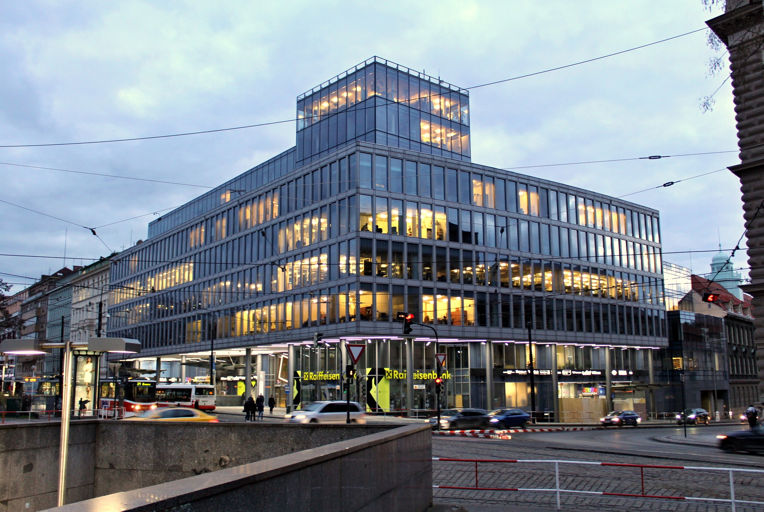 Karlovo nám. Galerie ATRIUM